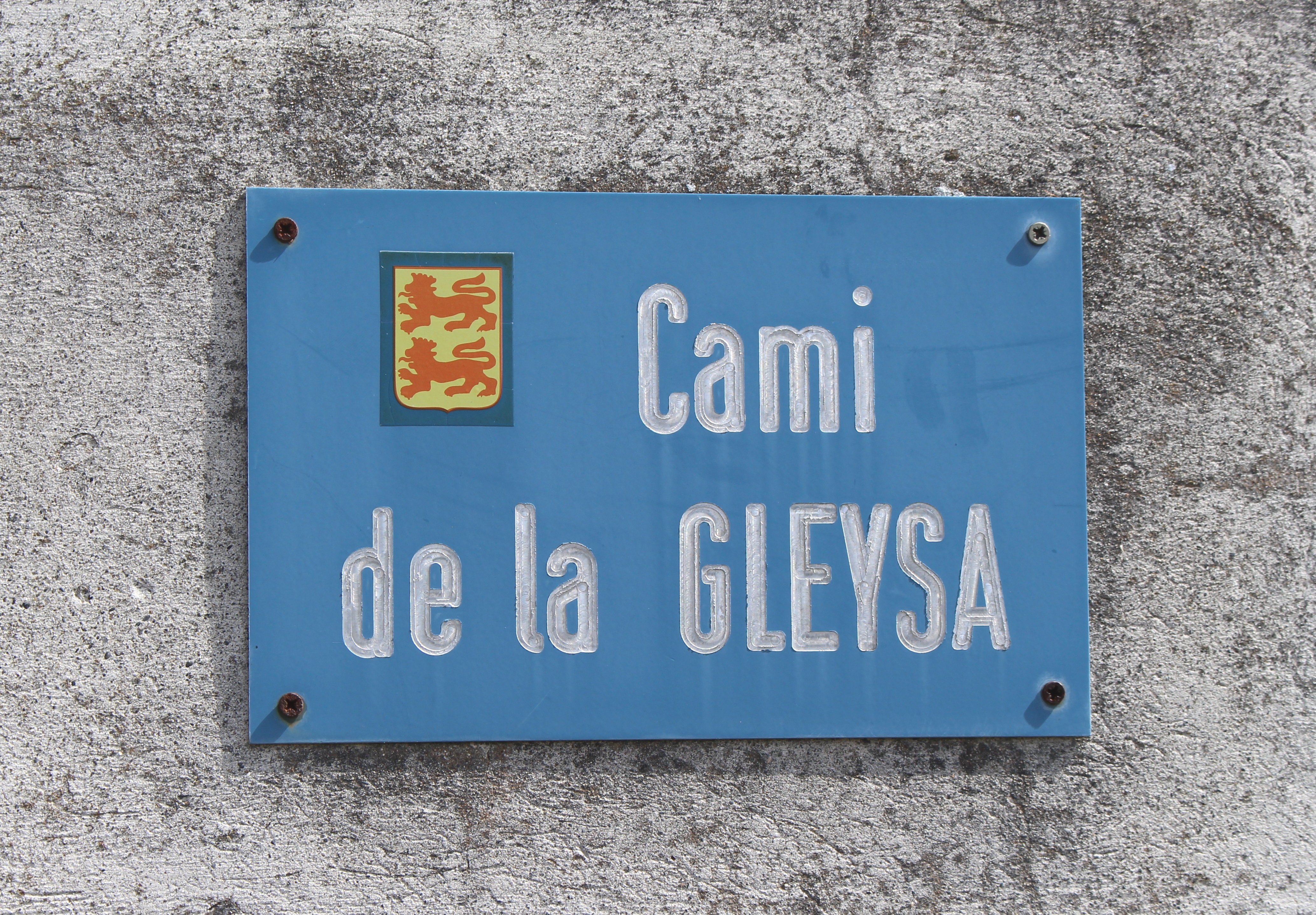 Rue du village de Saint-Lézer (Hautes-Pyrénées)